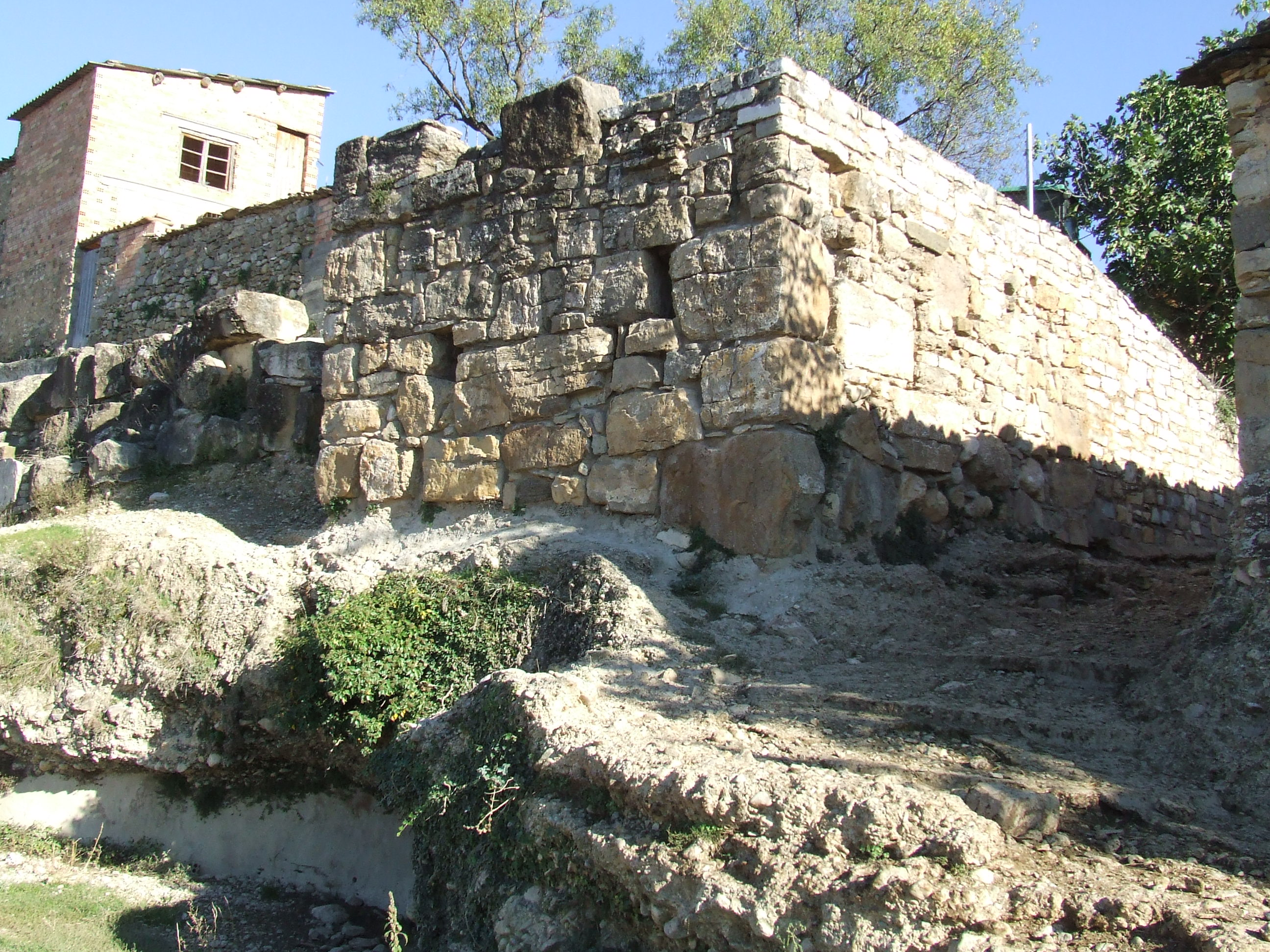 Fragment de la muralla d'Isona (Isona i Conca Dellà, Pallars Jussà). La torre de la Font de la Torreta, anomenada popularment la Torreta, així com tot un pany de paret de l'antiga muralla annex, presenten un aparell que deixen veure bastant clarament el seu origen ibèric, aprofitat i completat en època romana.